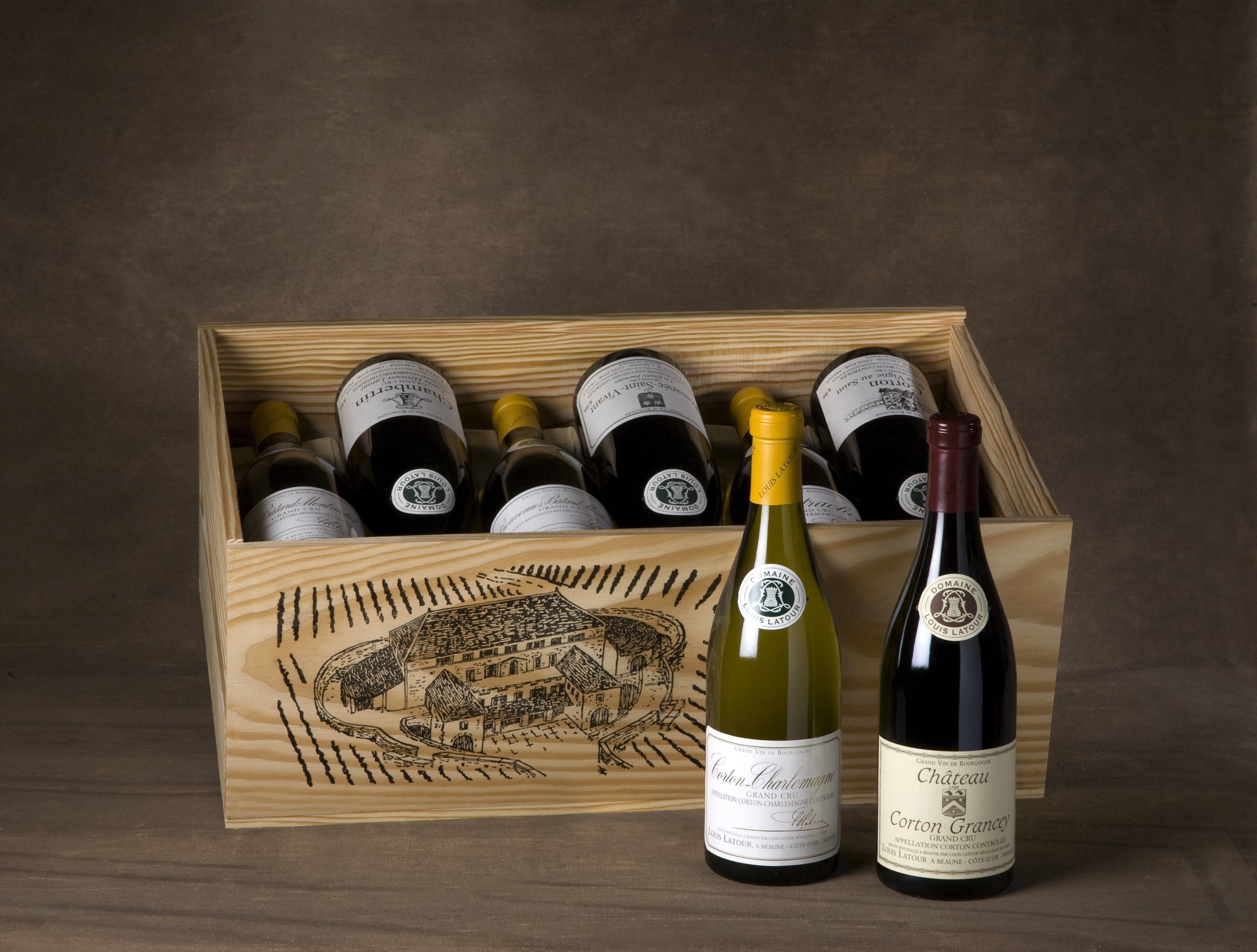 Caisse bois - Louis Latour Grands Crus